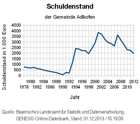 Entwicklung des jährlichen Schuldenstandes der Gemeinde Adlkofen im Zeitraum 1978 bis 2012